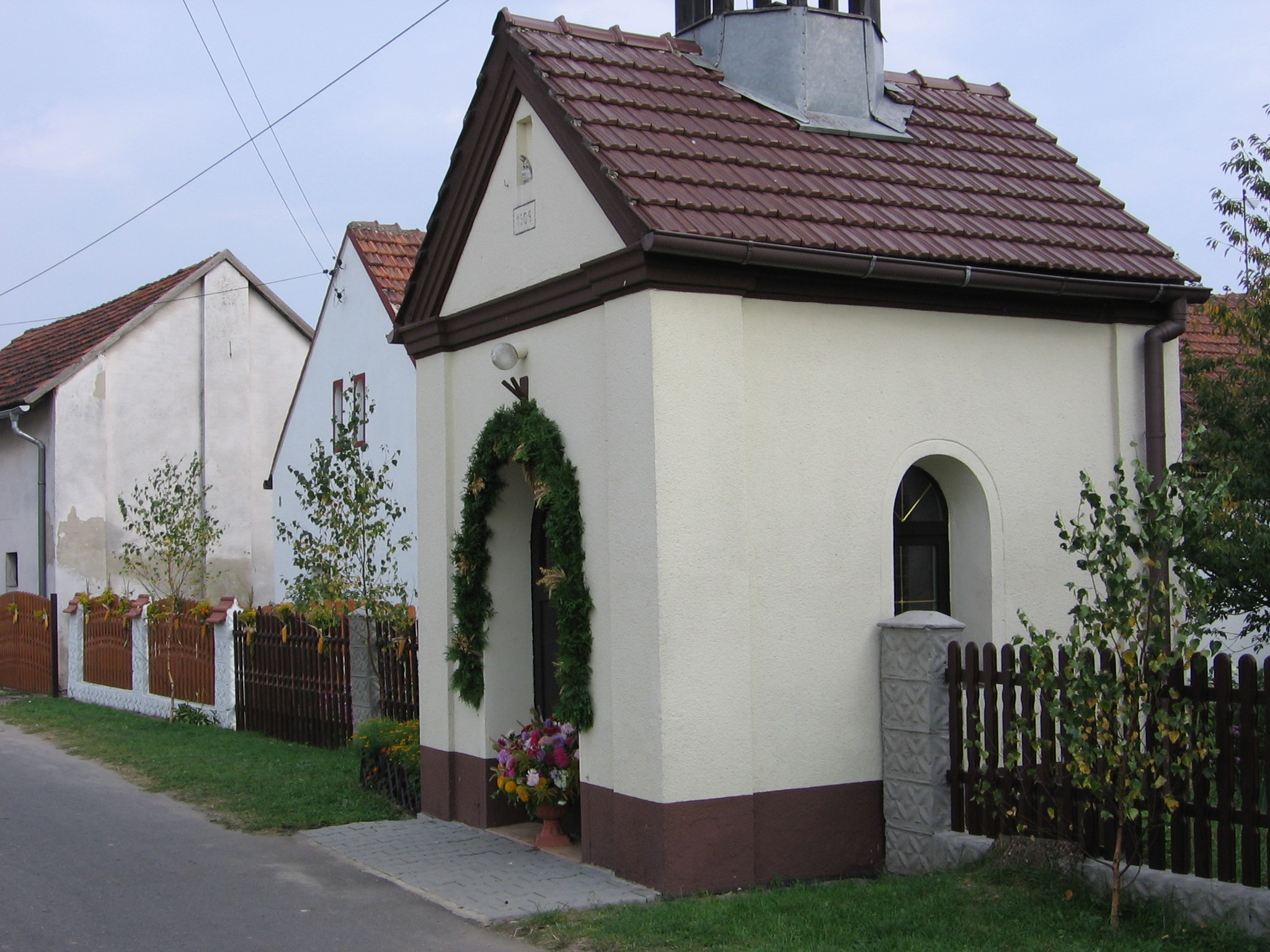 Zdjęcie przedstawia ogólnodostepną kapliczkę w Ciochowicach. Fotografia została wykonana przeze mnie aparatem cyfrowym 11.08.2006 roku.